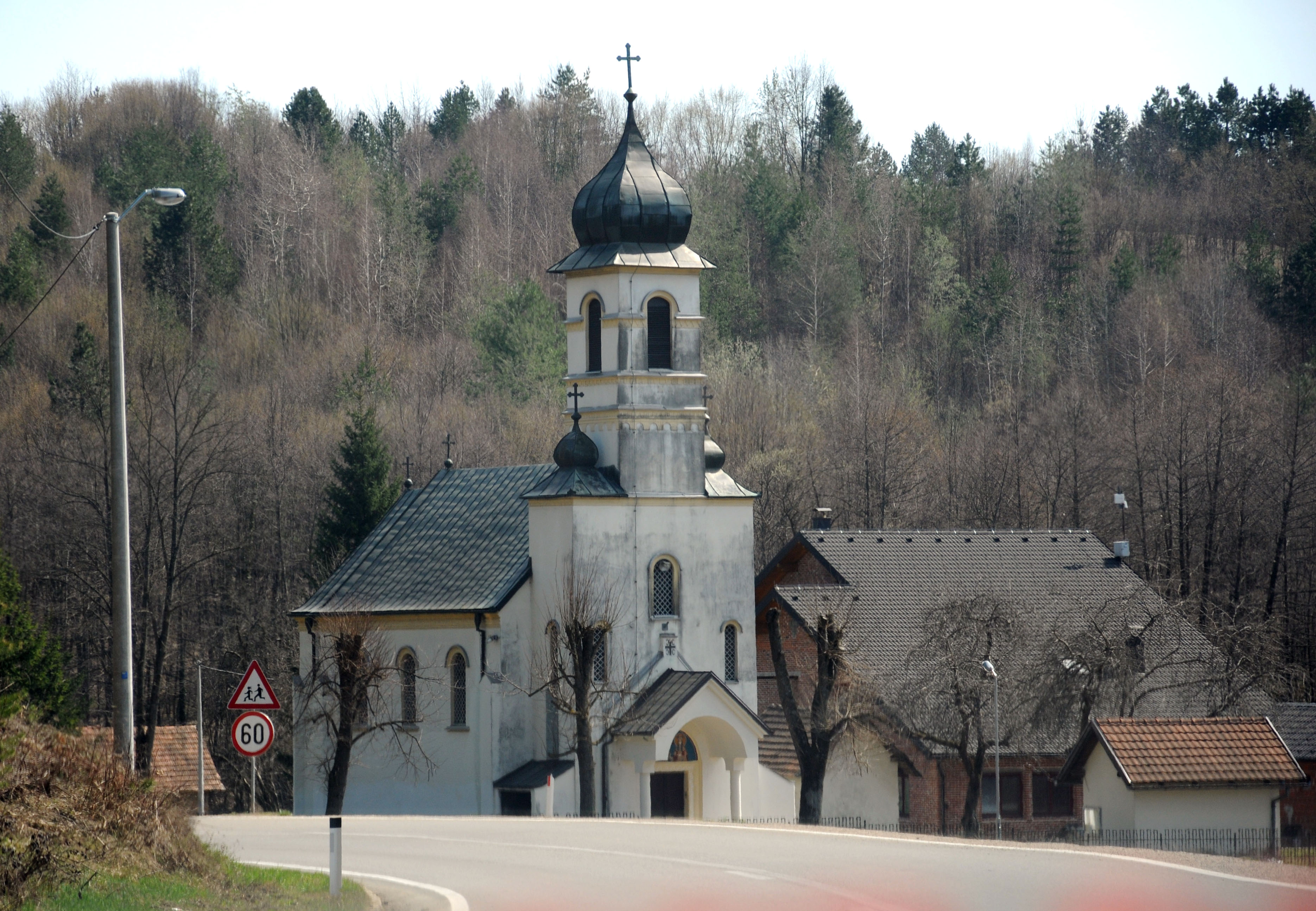 Pribinic crkva svetog Konstantina i Jelene This image was uploaded as part of Trace of Soul 2015.